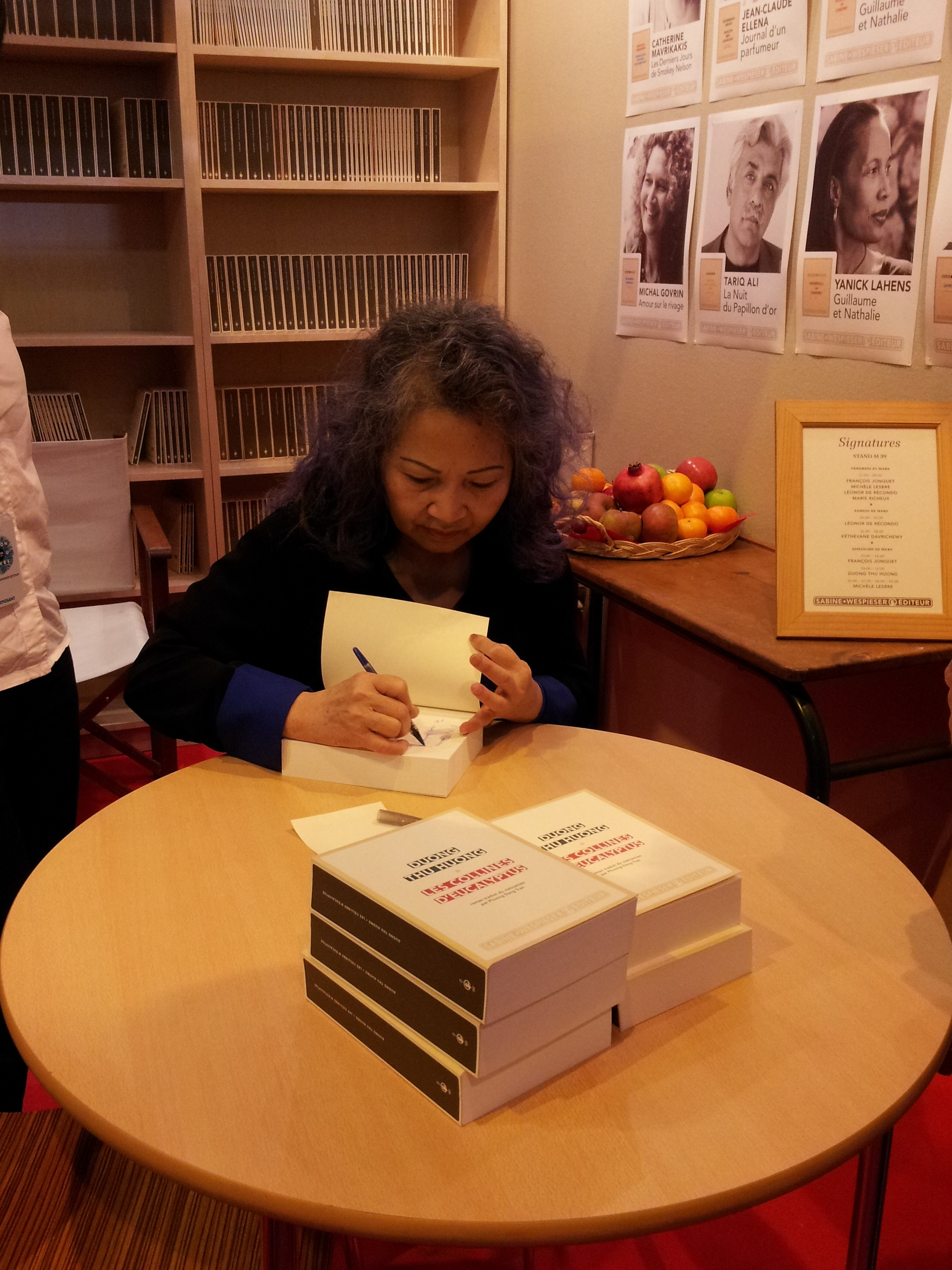 Dương Thu Hương au Salon du livre de Paris en 2014